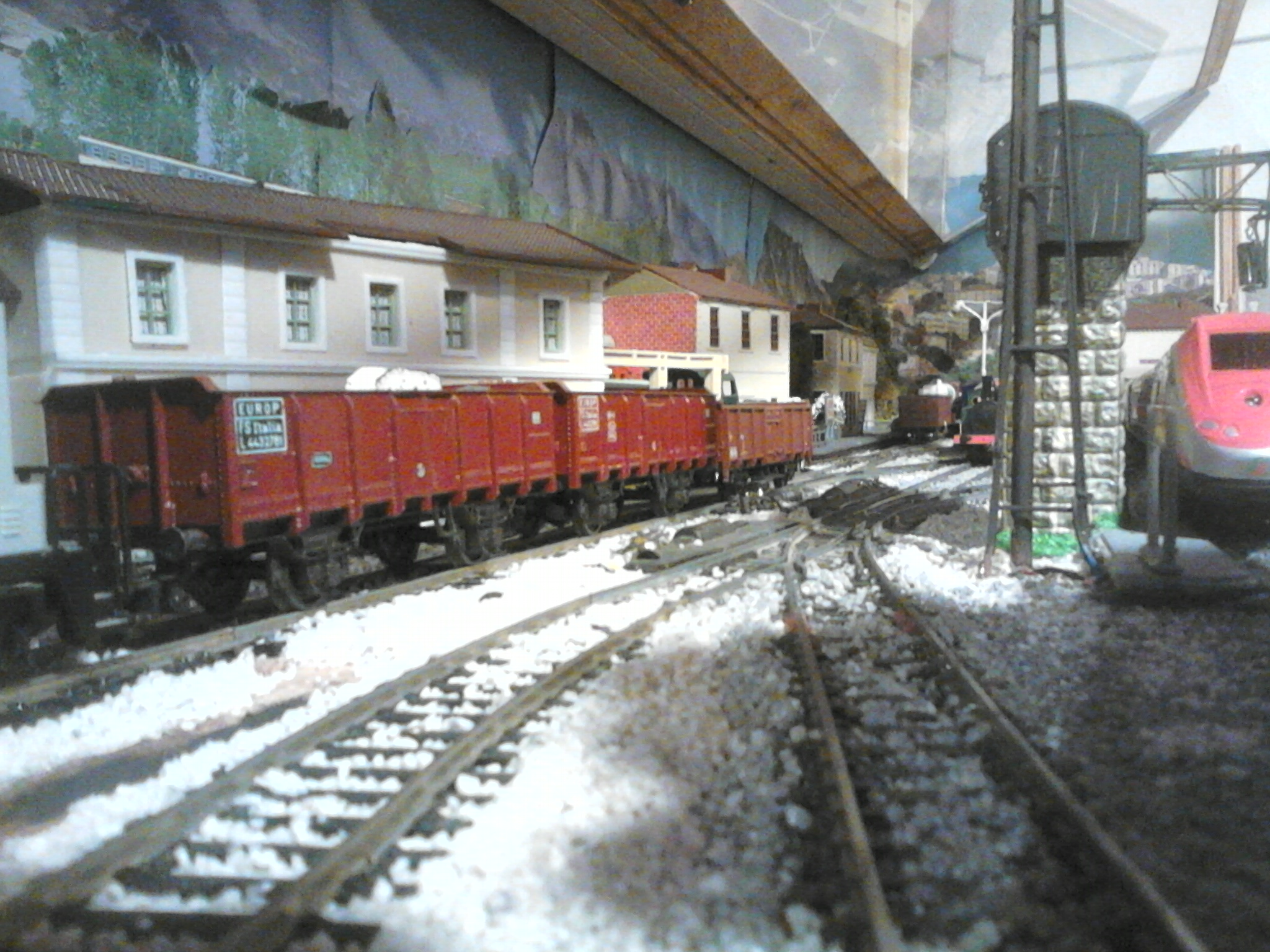 Vista di una porzione del plastico ferroviario in scala HO di Antonino Taverna, realizzato nel 2014